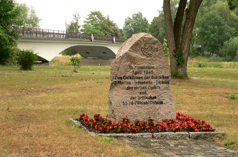 Kriegsdenkmal Rethem